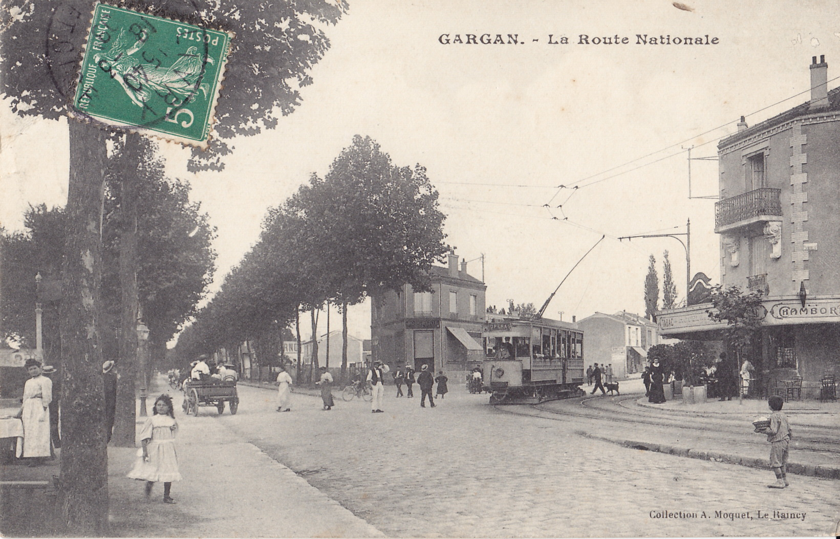 Carte postale ancienne éditée par A. Moquet au Raincy :GARGAN - La Route Nationale